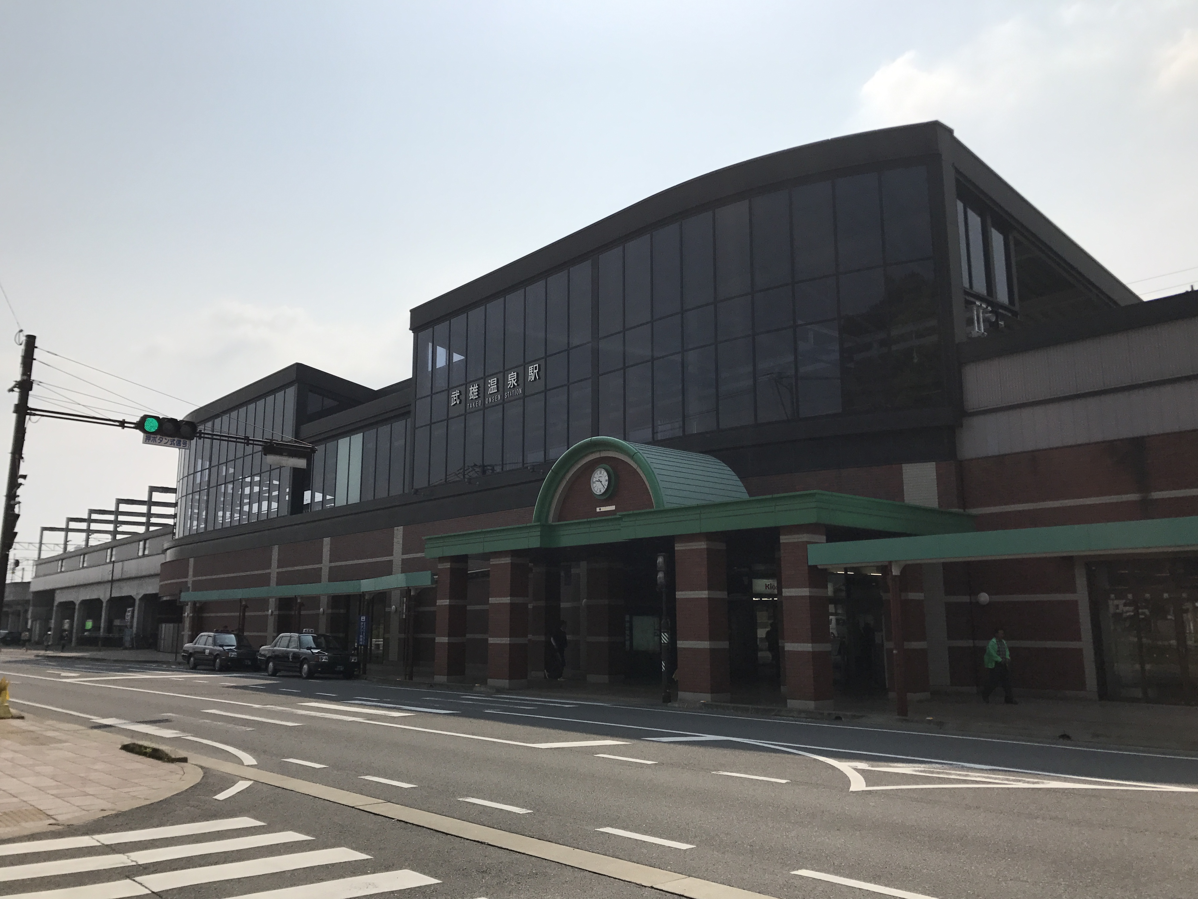 武雄温泉駅北口駅舎